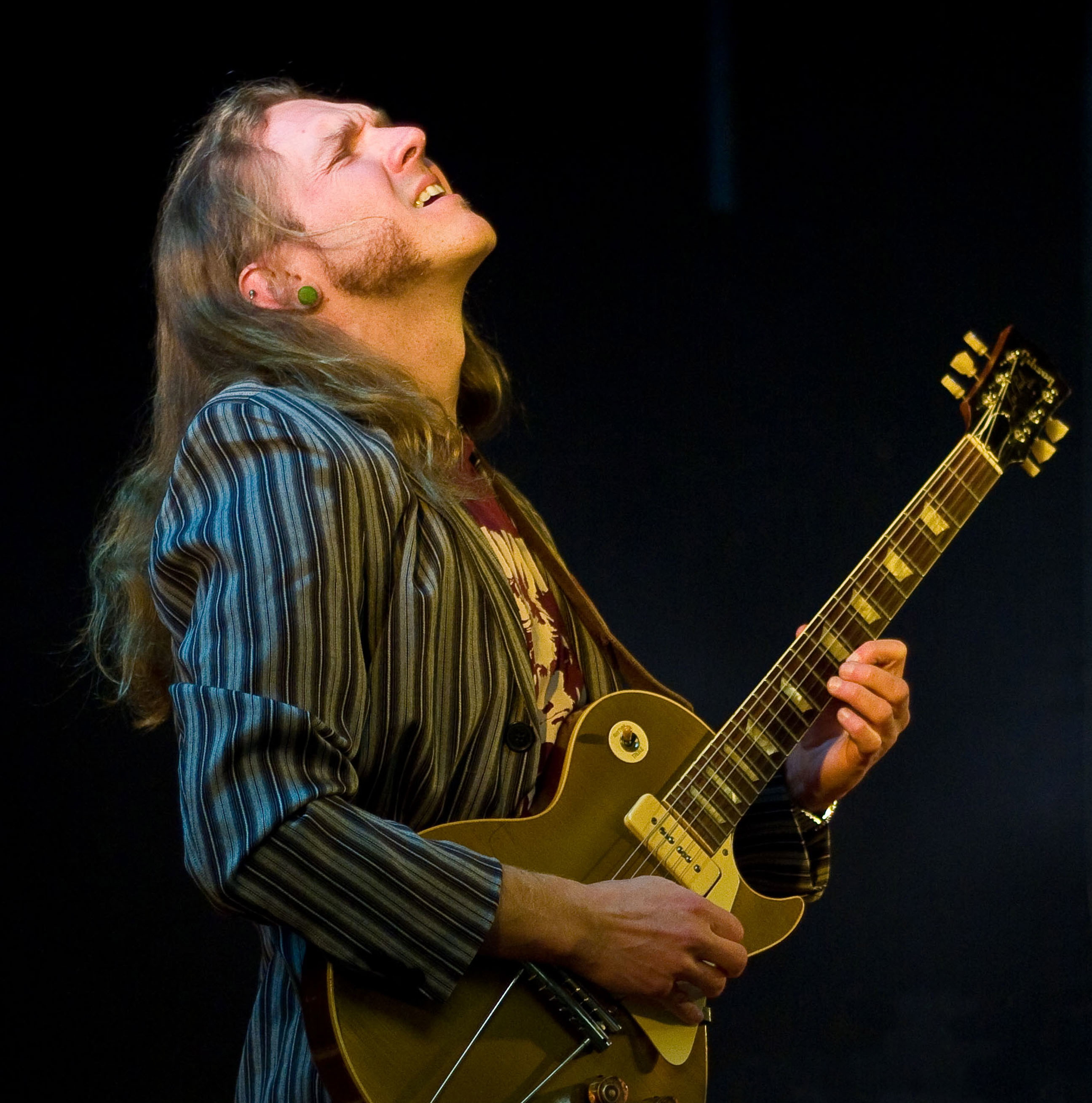 Mit Leidenschaft Musiker: Sven Kühbauch spielt eine Les Paul